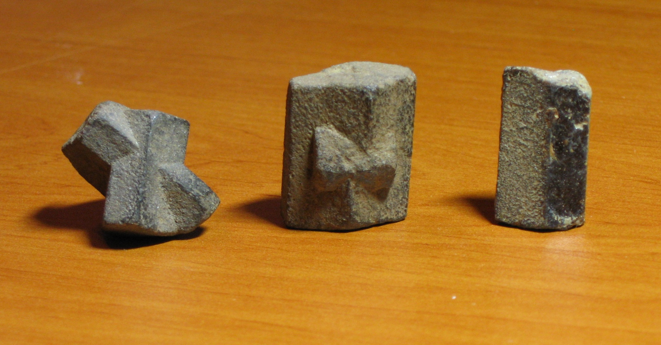 Source : photographiée par Ludovic MESSINGER le 3/08/2006 Les 3 types de Staurolites, également appelé Staurotide et "pierres de croix" provenance : Bretagne, France